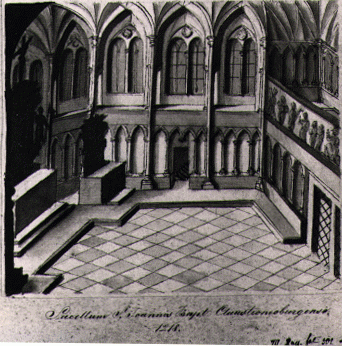 Capella Speciosa in Klosterneuburg. Zeichnungen von Benedikt Prill.